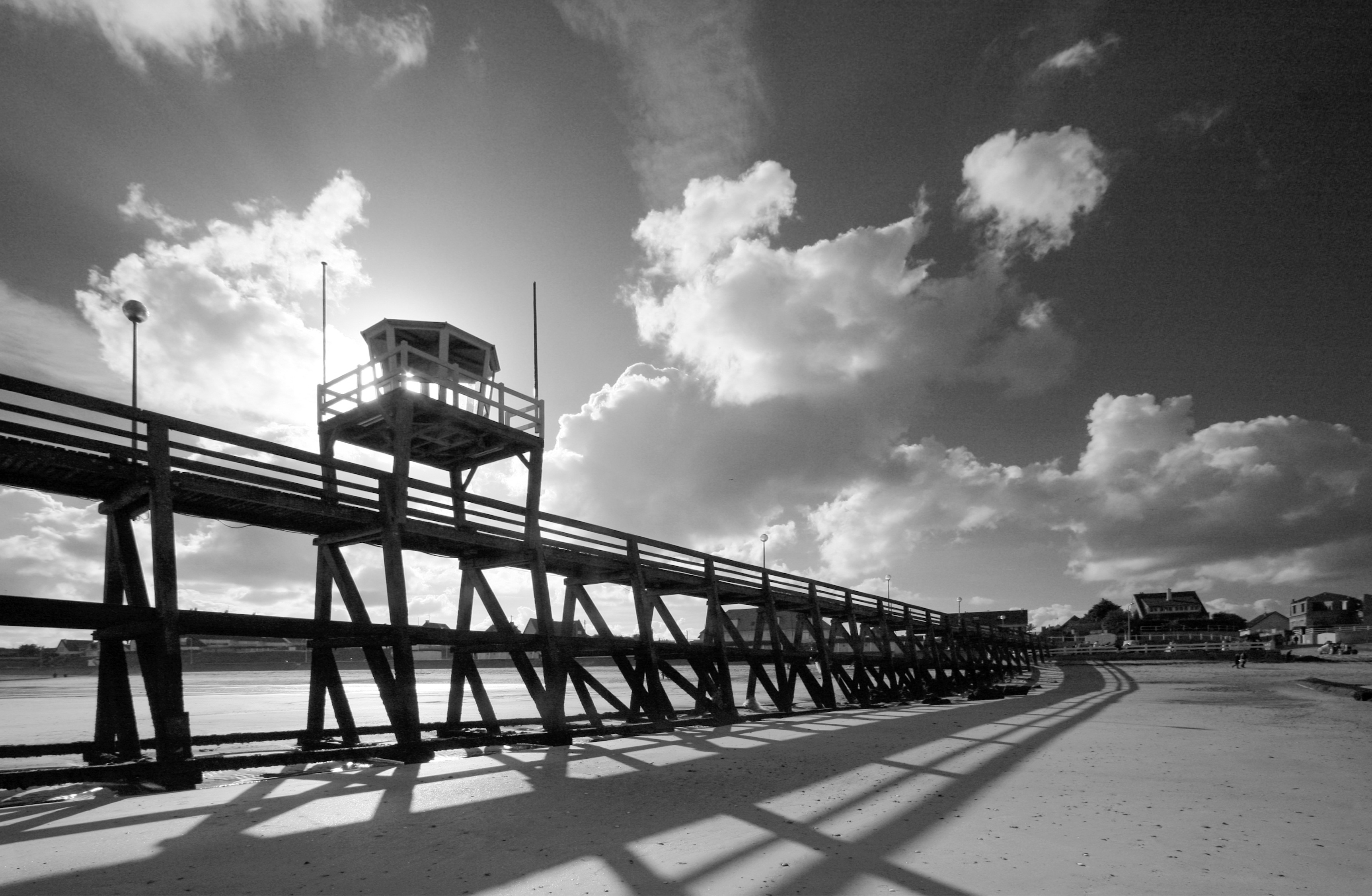 Jetée de Luc-sur-Mer, Calvados, France.